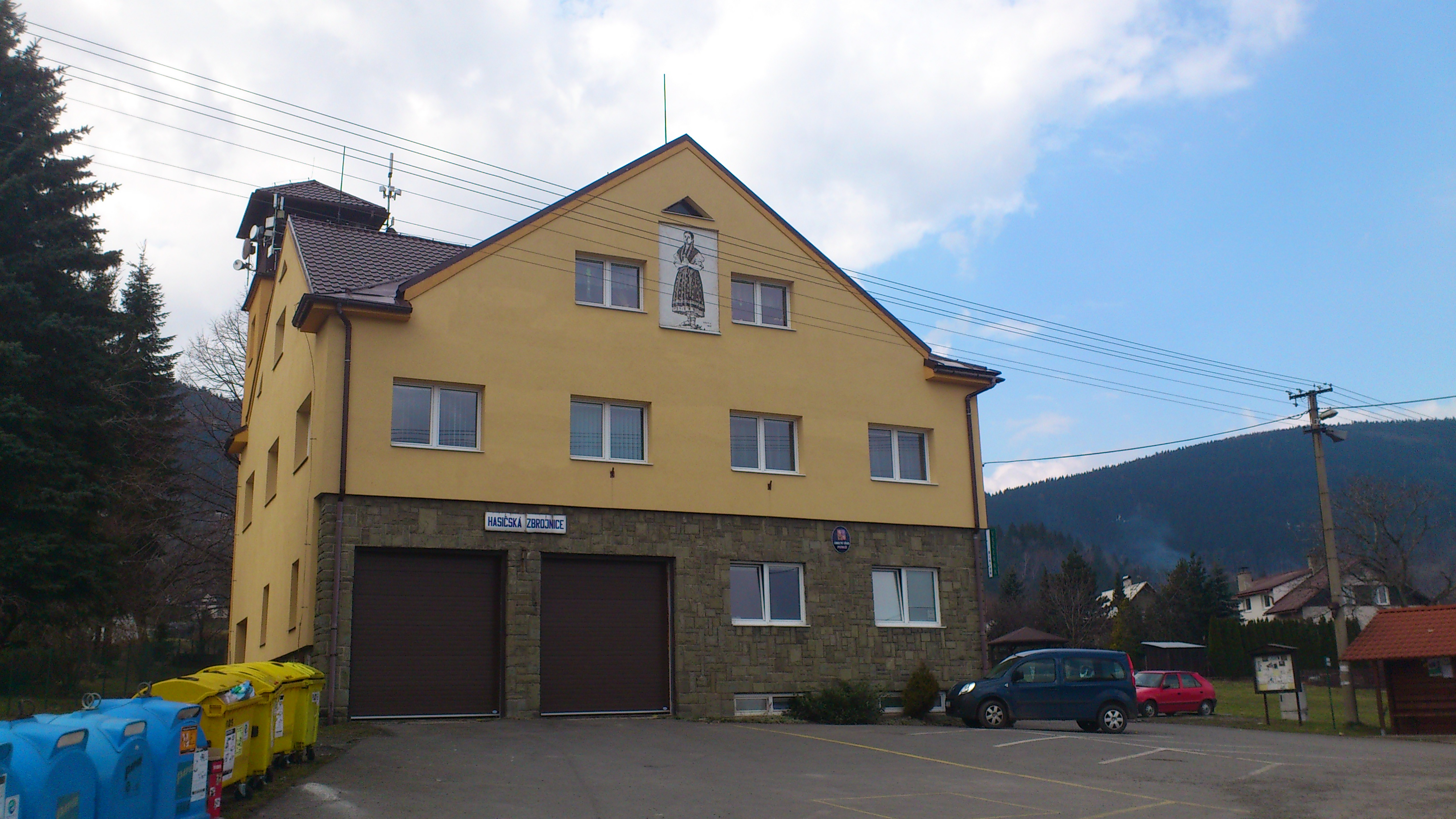 Hasičská zbrojnice a obecní úřad ve Pstruží, okres Frýdek-Místek.